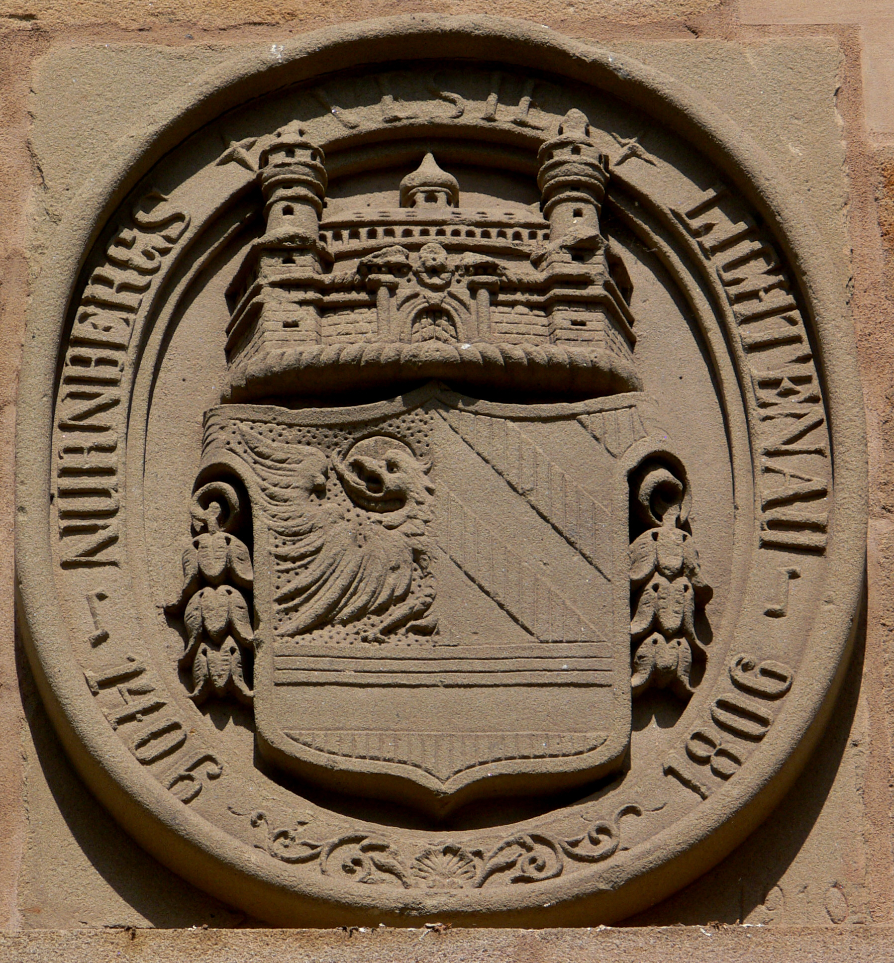 Festung Lichtenau, Lichtenau (Mittelfranken), Landkreis Ansbach Wappen des Pflegamts Lichtenau (?) über dem Eingang zum Hauptgebäude (Schildfuss aus dem Wappen der Herren von Heideck, darüber das kleine Wappen der Reichsstadt Nürnberg, siehe HdbG)